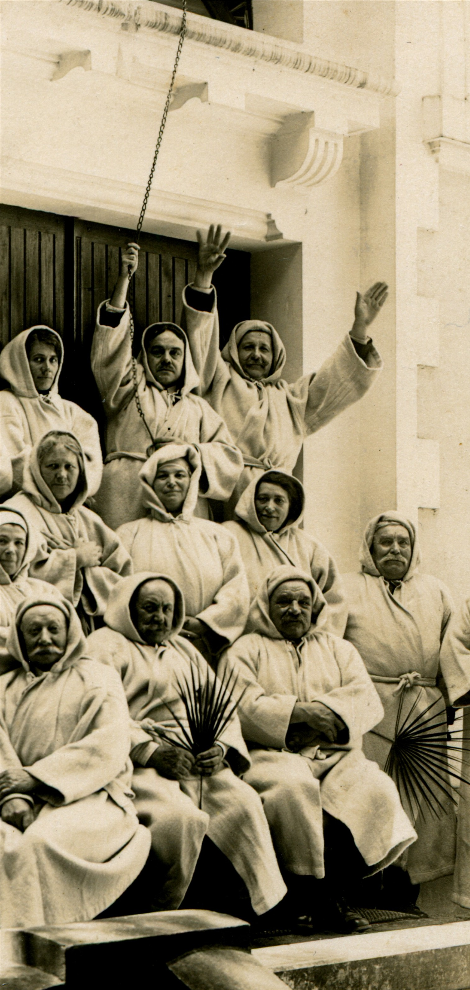 Vue prise par le photographe Ocana de Dax dans les années 1920 (tiréee des archives de Mr Laussu Kévin, fond LESBEC)